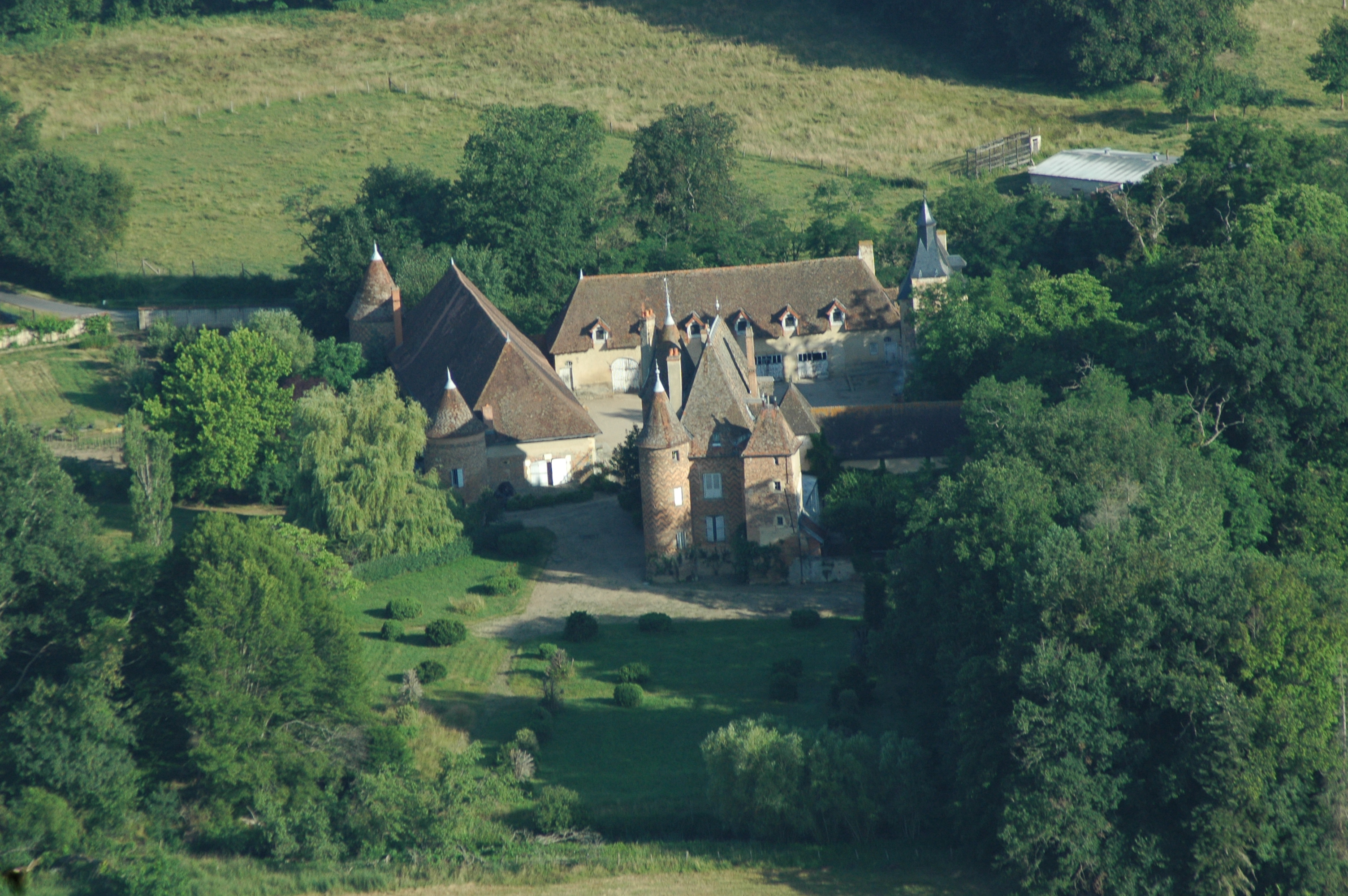 Photo aérienne du château de la Cour à Chapeau, Allier